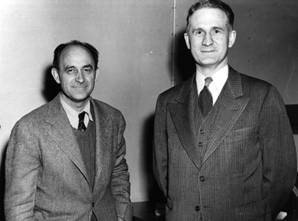 Fotografía en la que aparecen los físicos Enrico Fermi (izquierda) y Walter Henry Zinn (derecha).